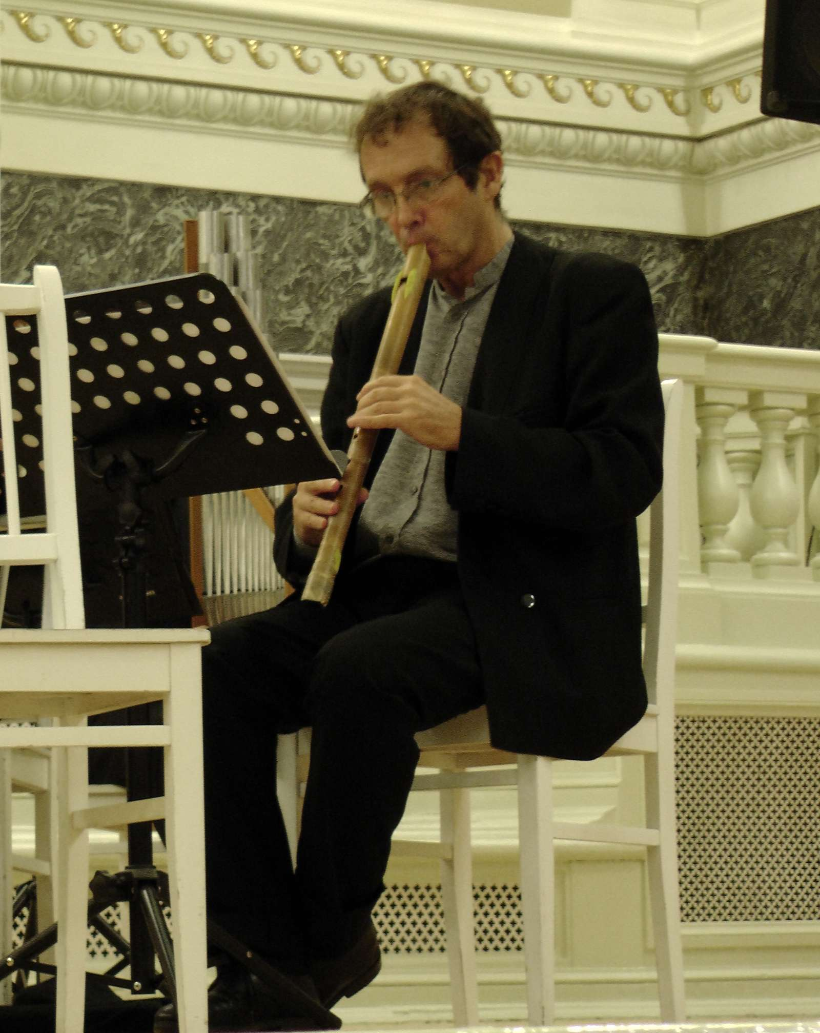 Педро Мемельсдорф на фестивале Earlymusic-2015. Санкт-Петербург. Капелла.